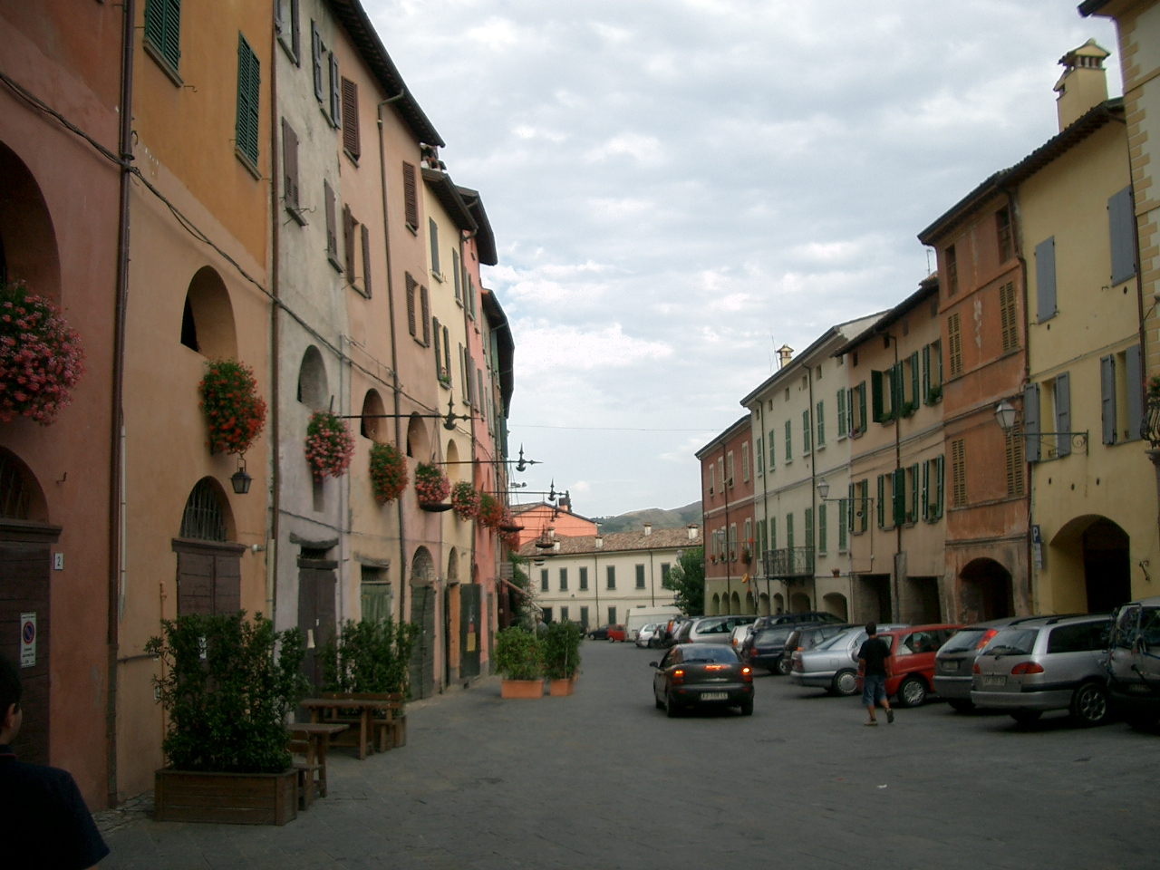 Brisighella is een gemeente in de Italiaanse provincie Ravenna (regio Emilia-Romagna). eigen werk Ruben Alexander